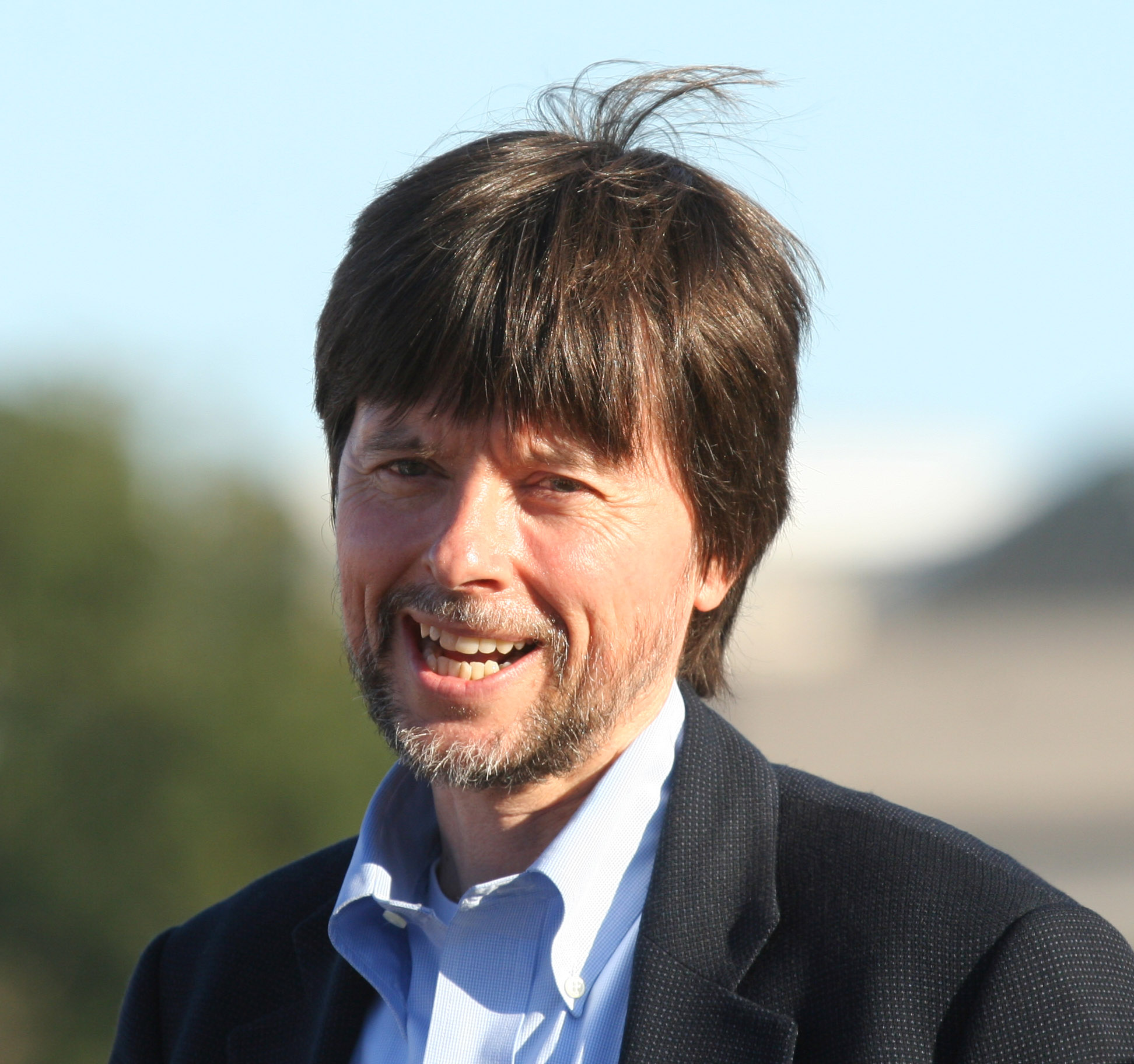 Ken Burns, Documentary filmmaker